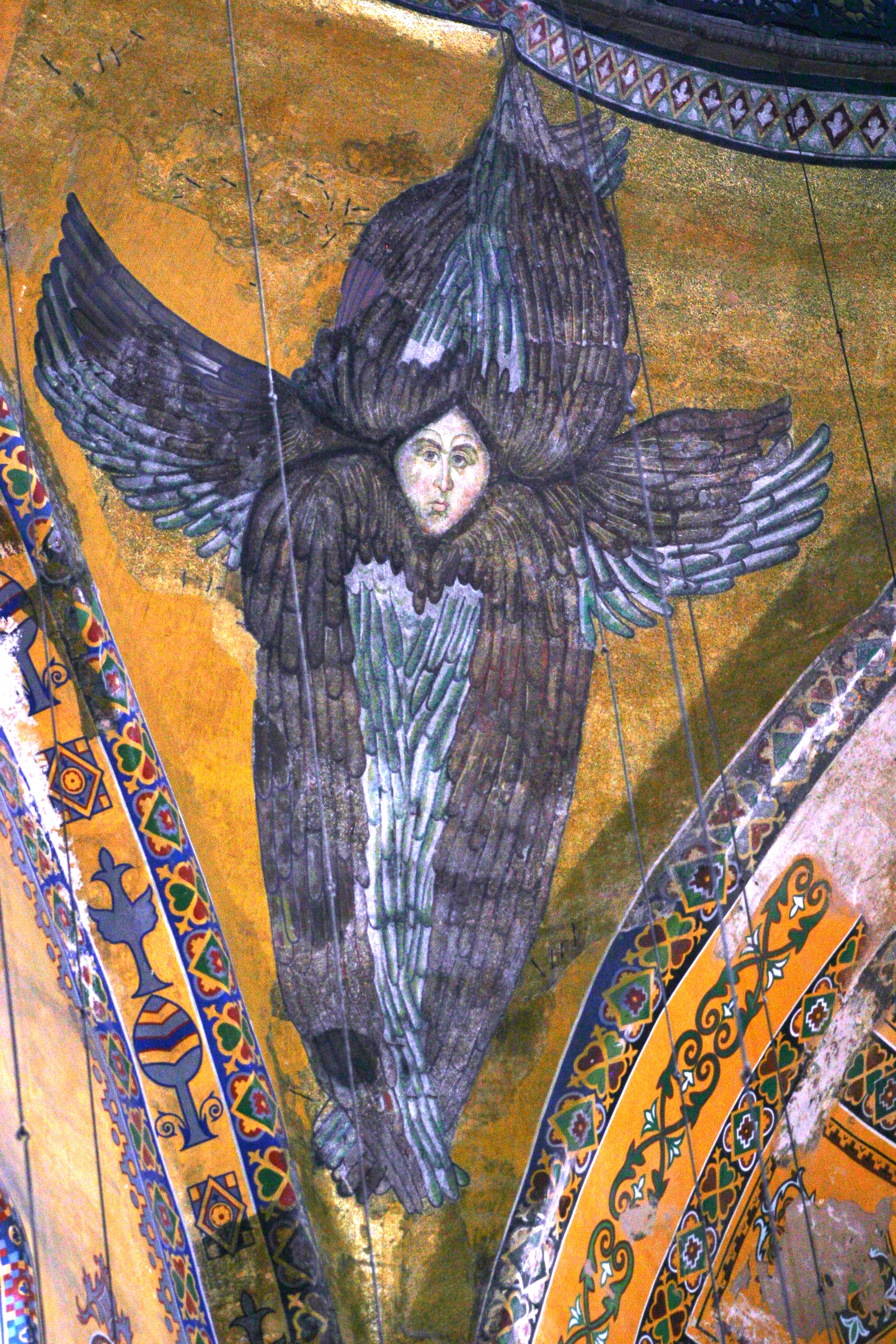 Serafim em Santa Sofia